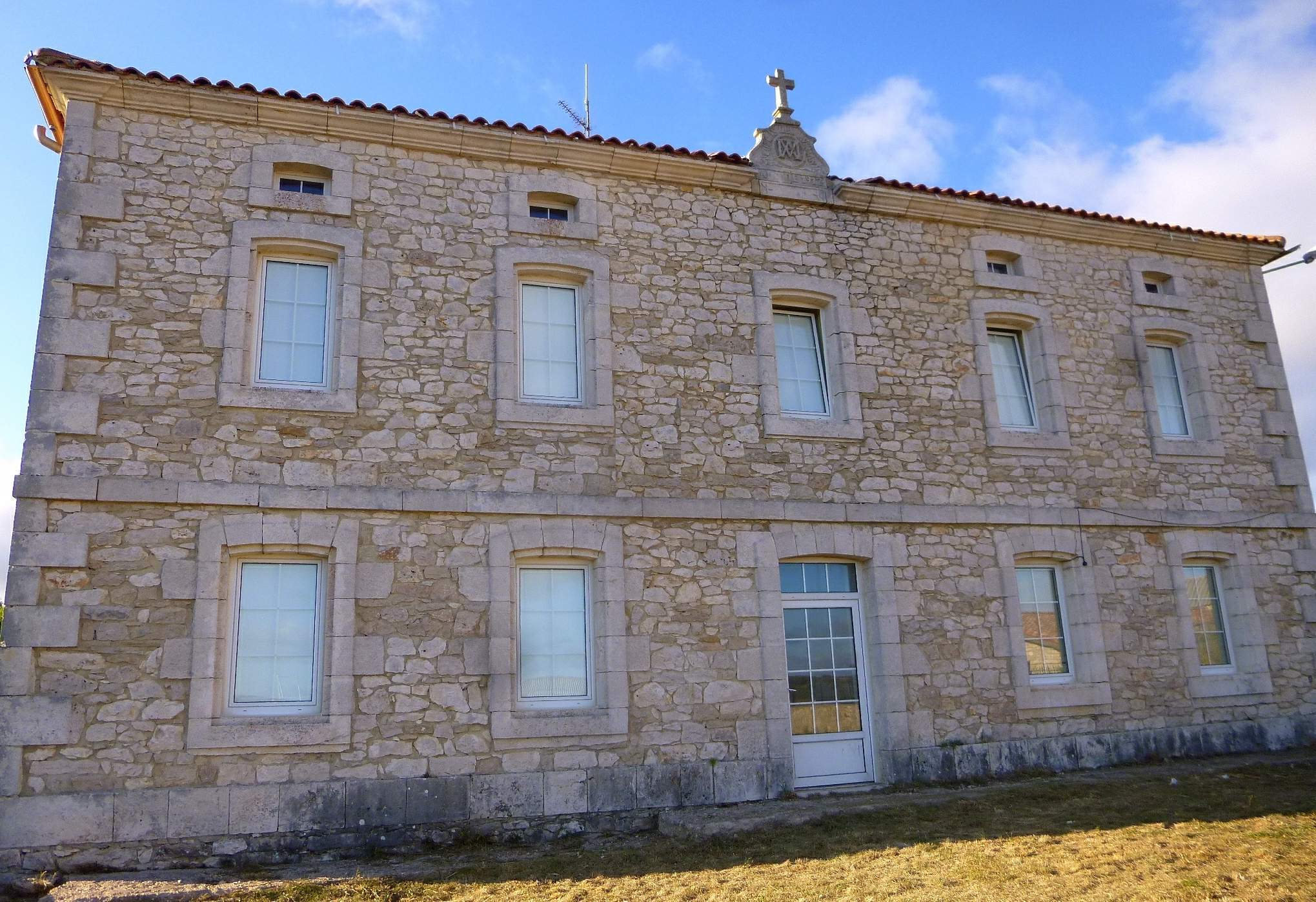 Sargentes de la Lora (Burgos) - Escuela del Ave María